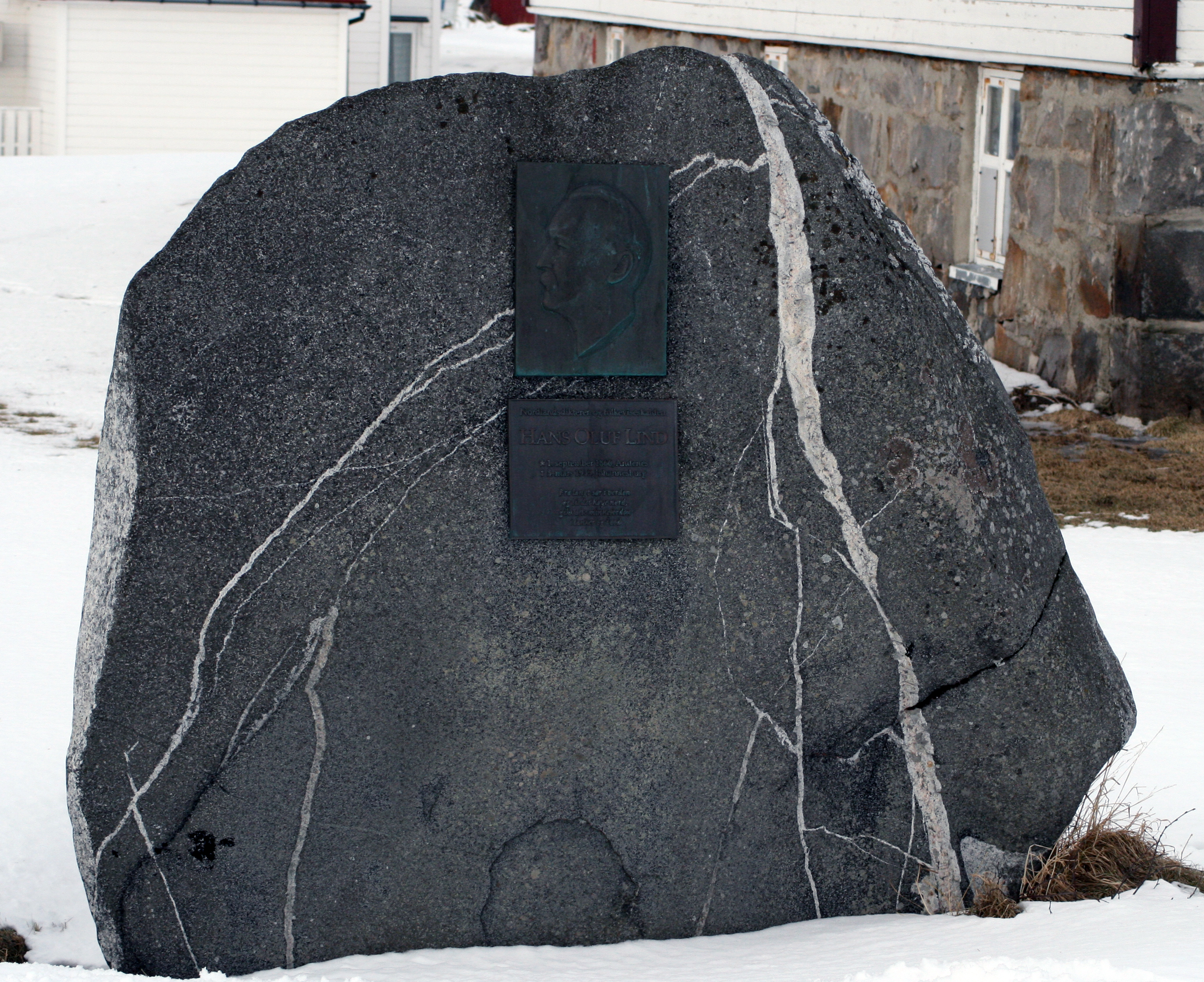 Minnestein over Hans Lind i Andenes sentrum